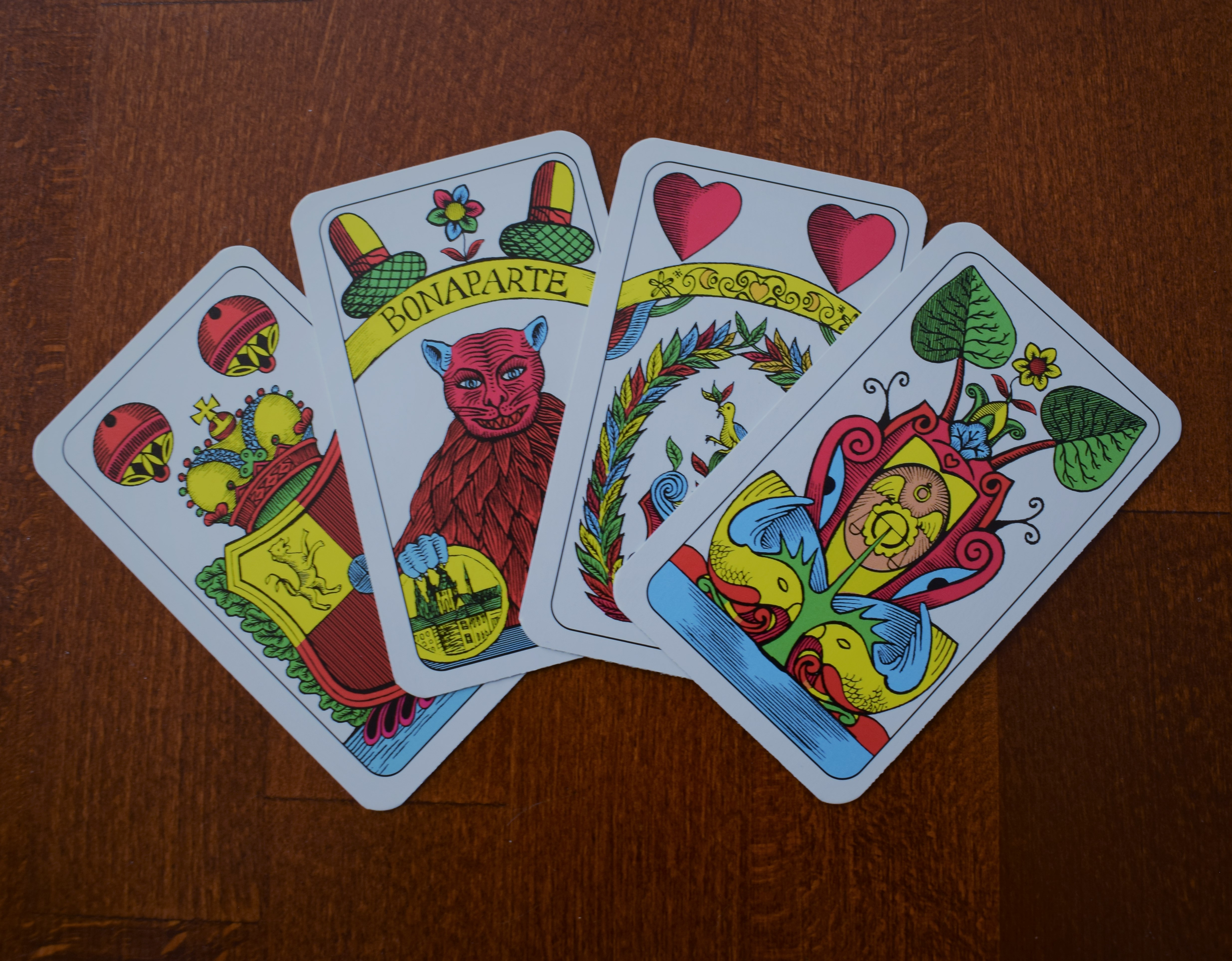 figura při karetní hře cenzr